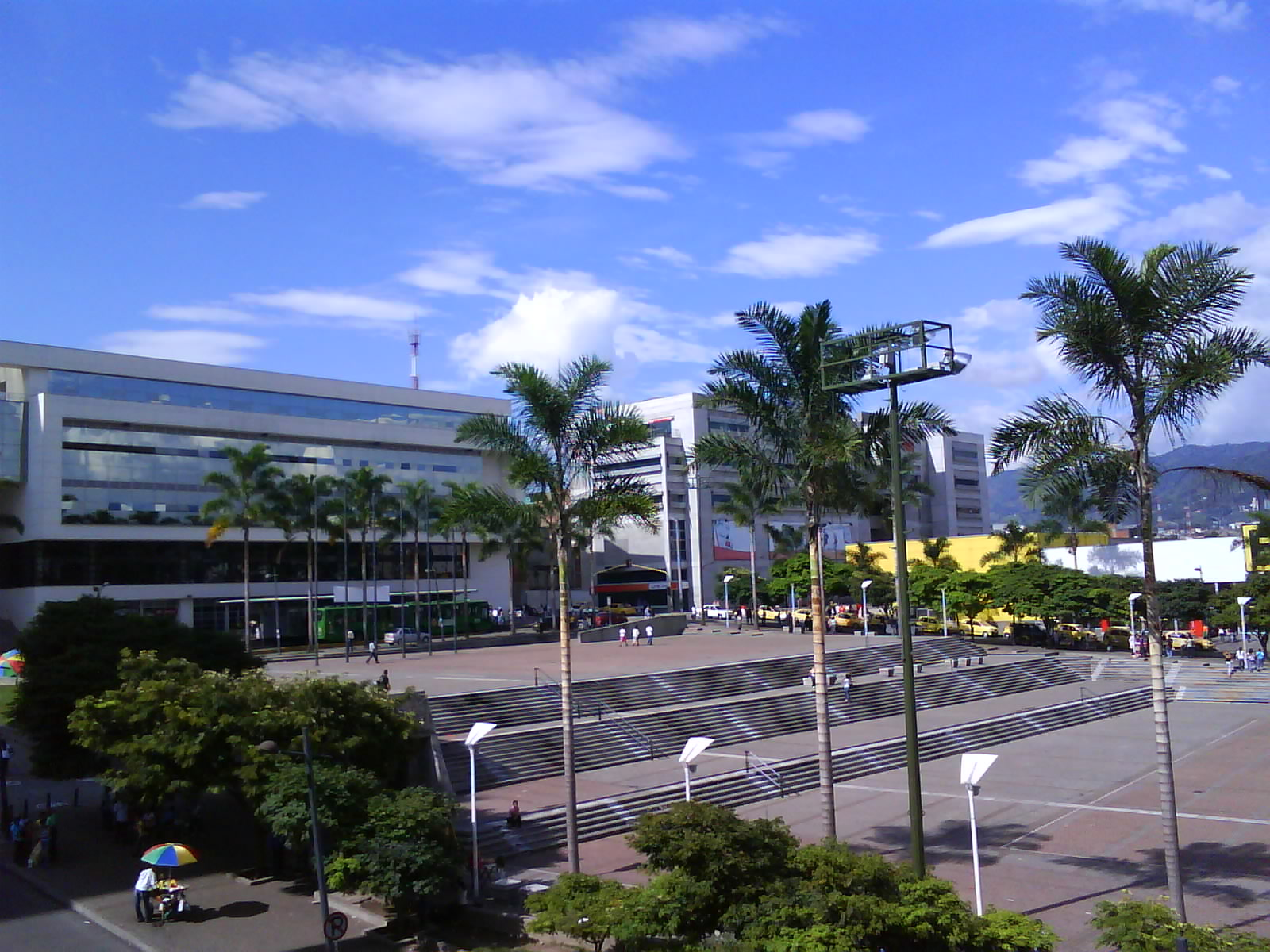 Ciudad Victoria - Lucy tejada